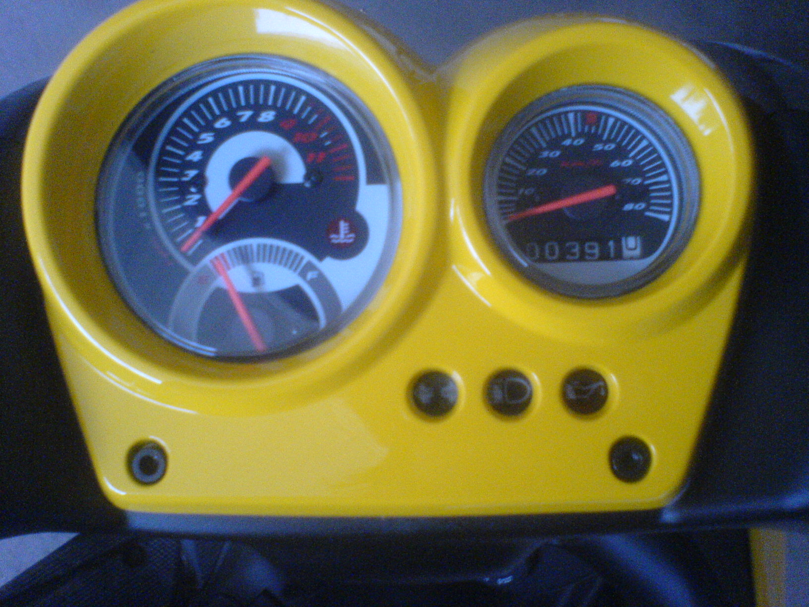 Dieses Bild zeigt den Tacho von einer Aerox Race Replika